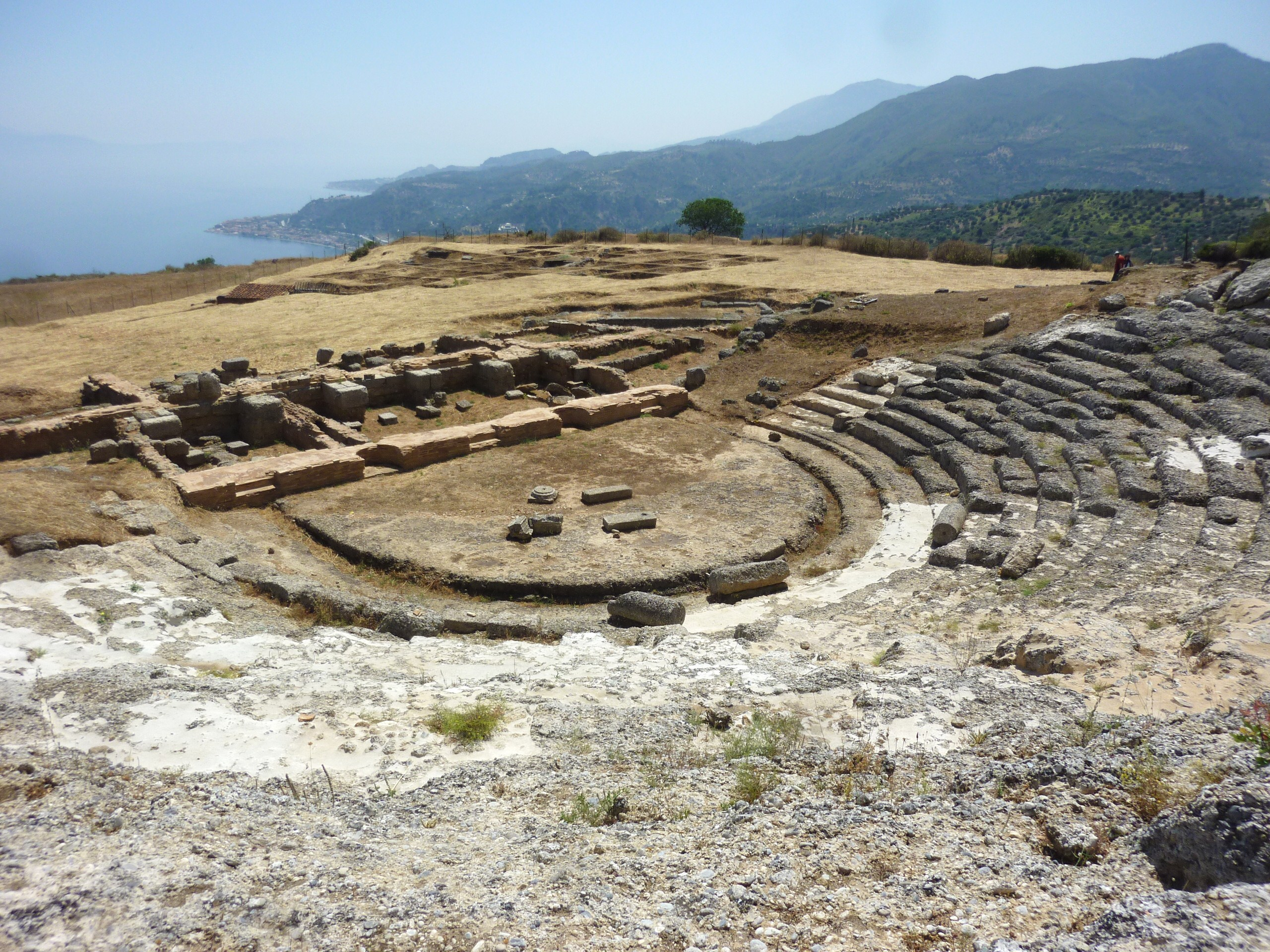 Théâtre antique d'Egira, Grèce